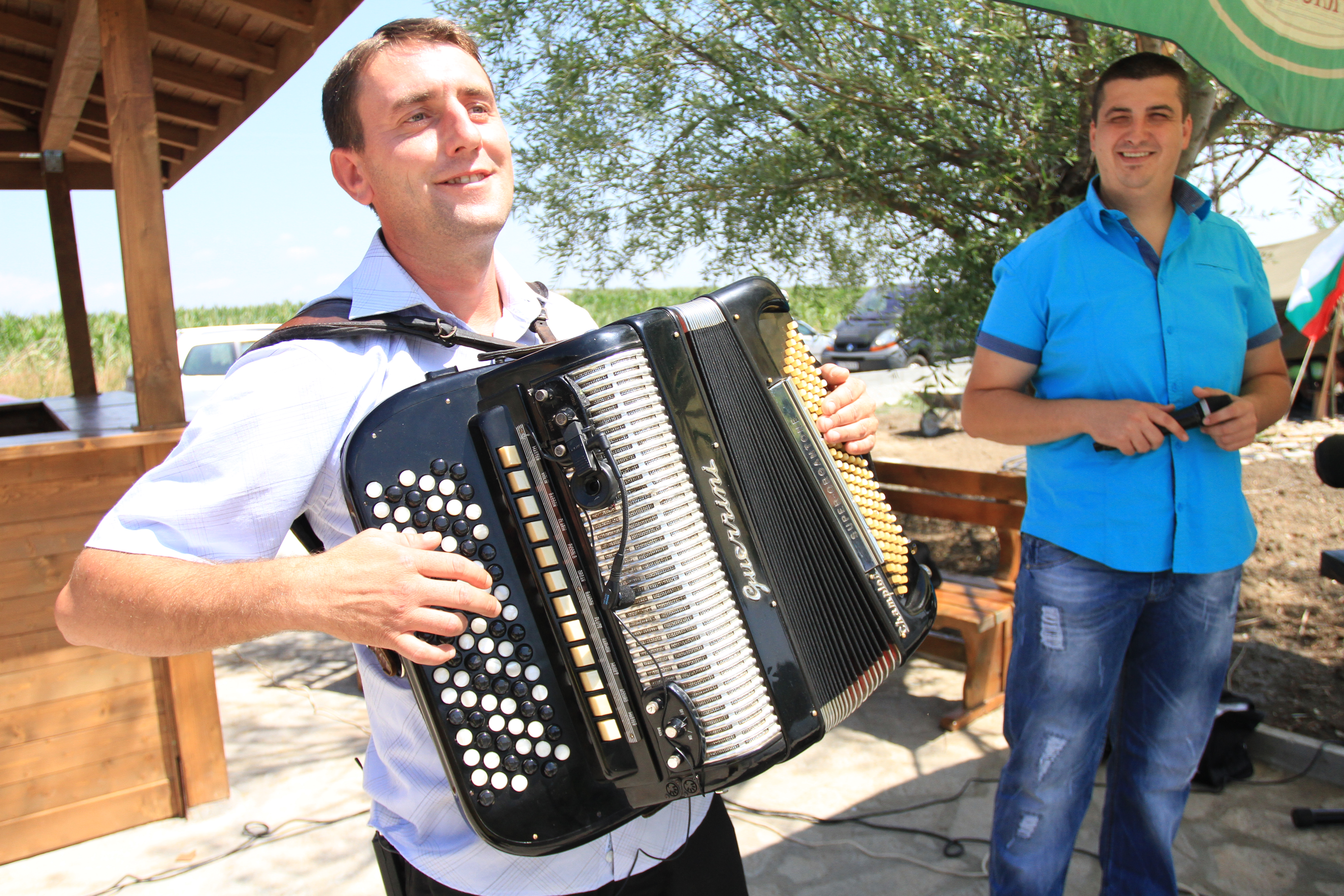 Сръбски акордионист